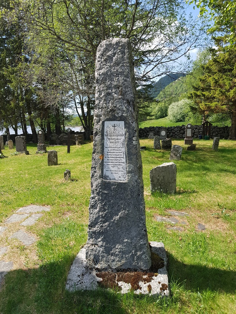 Minnestenen til Myllarguten på kirkegården til Rauland kirke